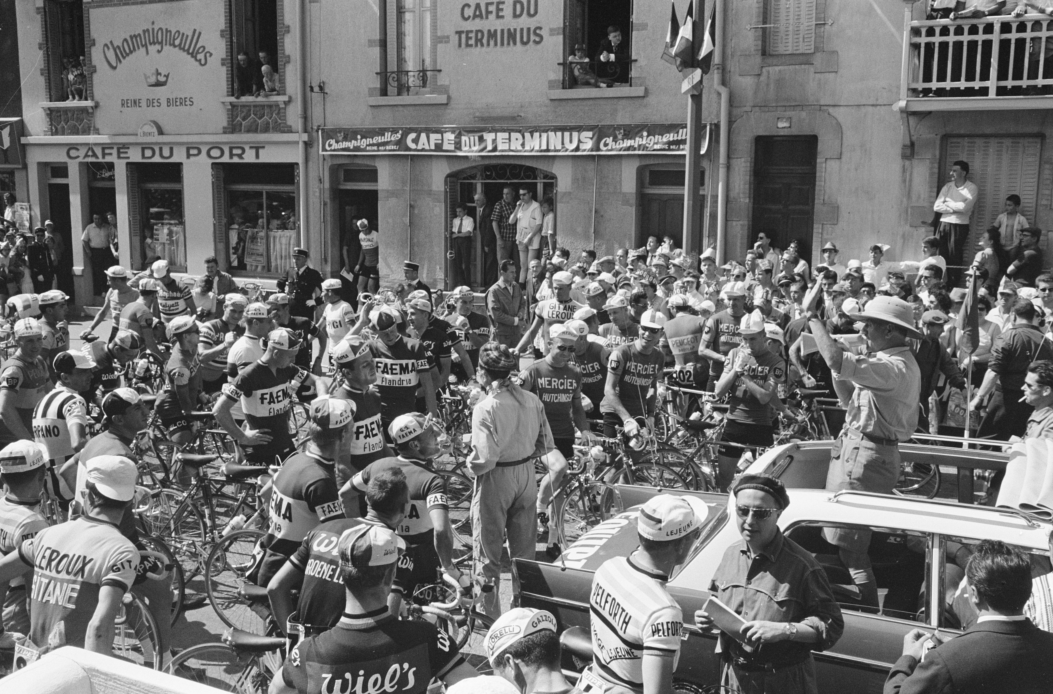 Tour de France 1962 , peloton voor de start